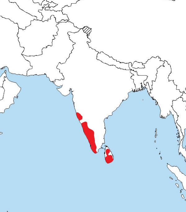 Мапа поширення Batrachostomus moniliger